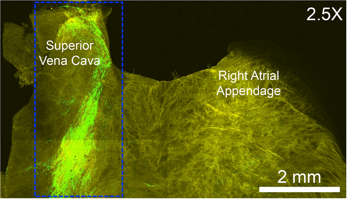 Figura s002. Citoestructura del Nodo Seno-Auricular (NSA) mediante Inmunohistoquímica. Cardiomiocitos de conducción del Nódulo SA (en verde). Cardiomiocitos contráctiles de la Aurícula derecha (en amarillo). Vena Cava Superior (a la izquierda) y Orejuela derecha (a la derecha). Corazón de ratón.